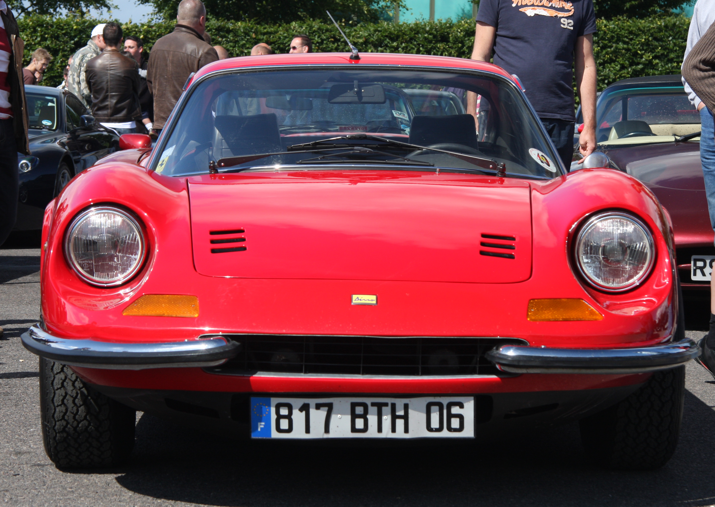 Dino